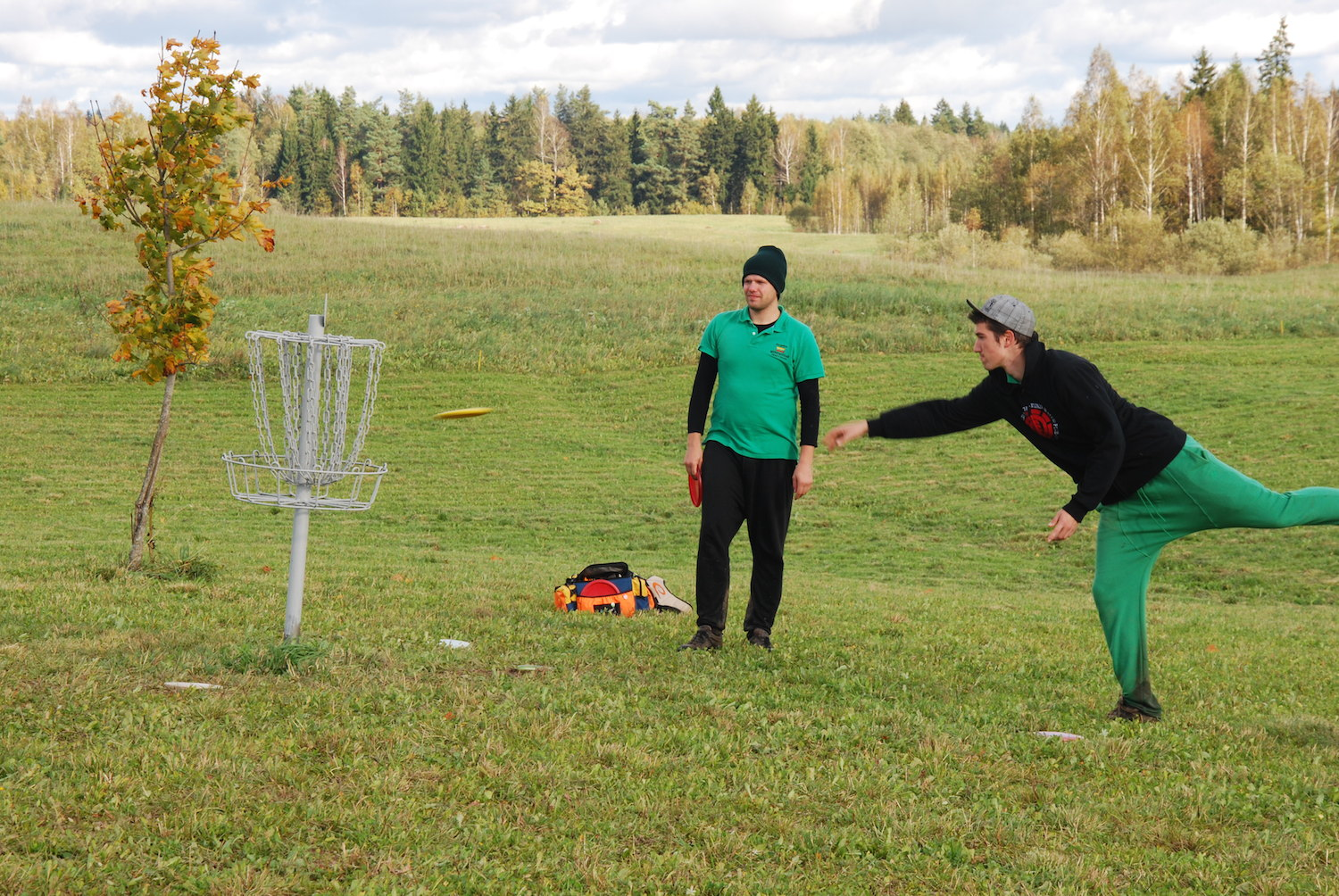 Licensija